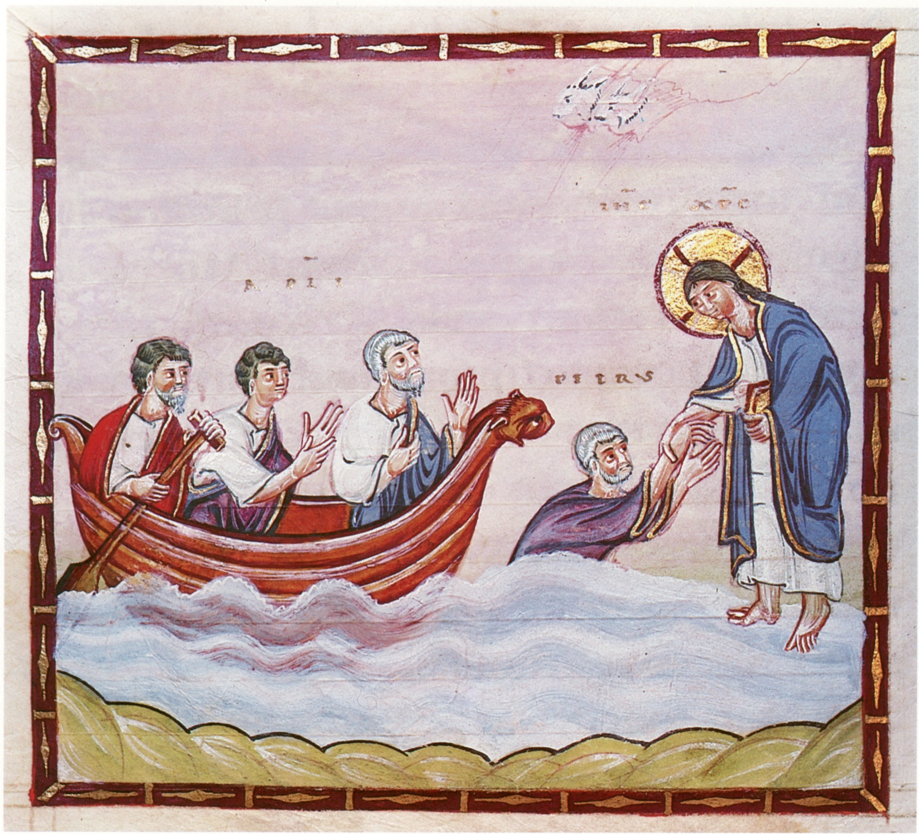 Codex Egberti, fol. 27v. Rettung des sinkenden Petrus